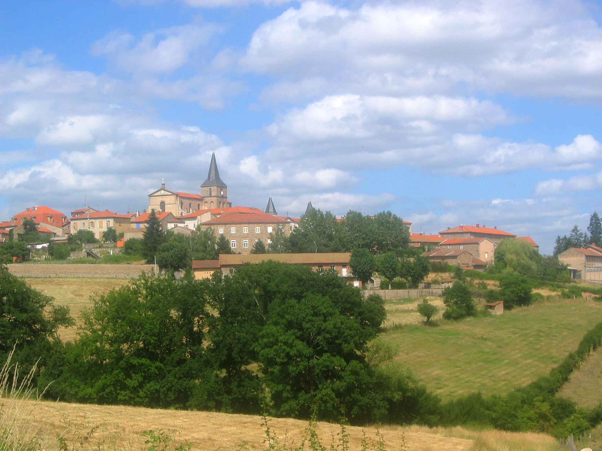 Vue générale